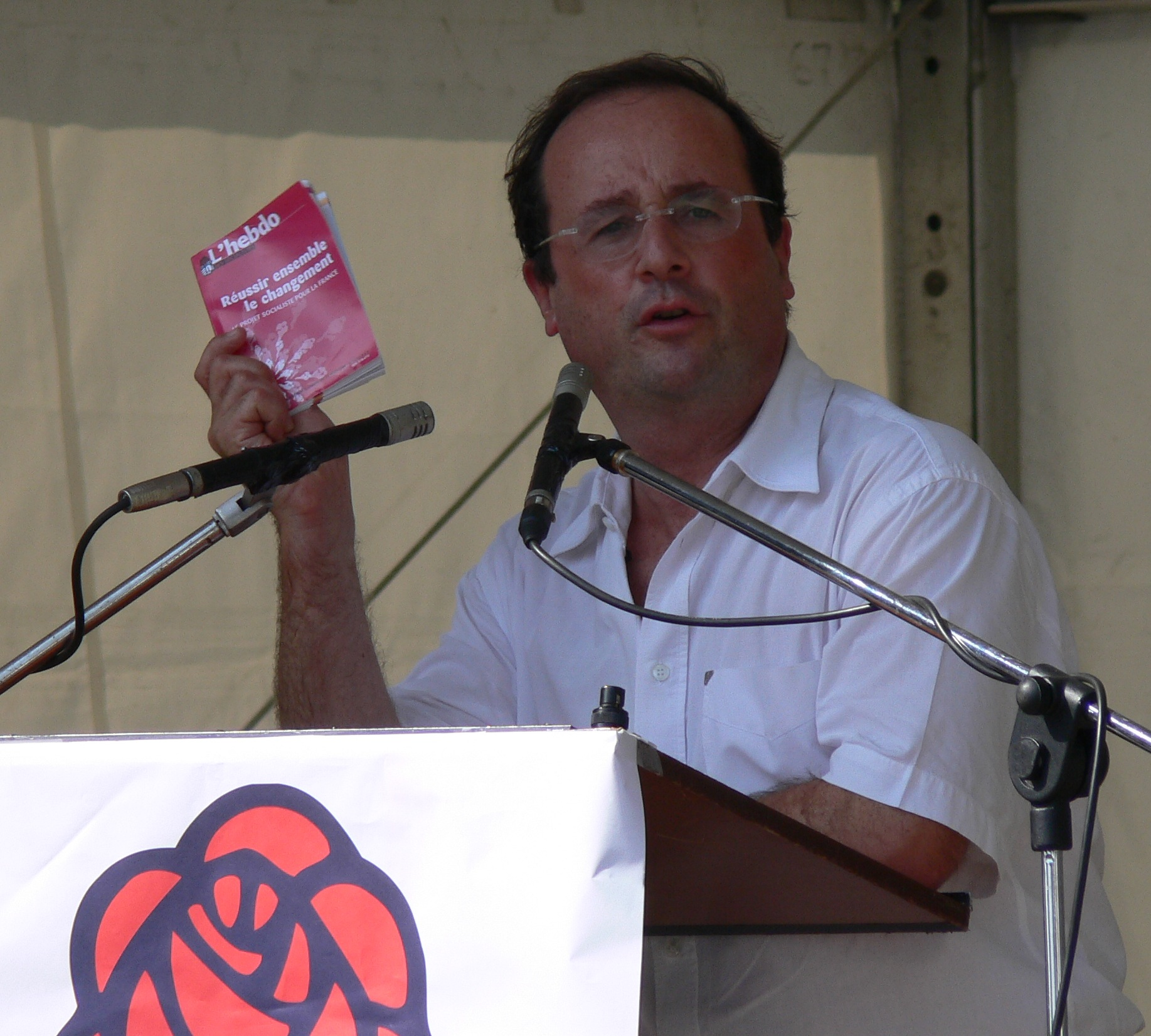 François Hollande